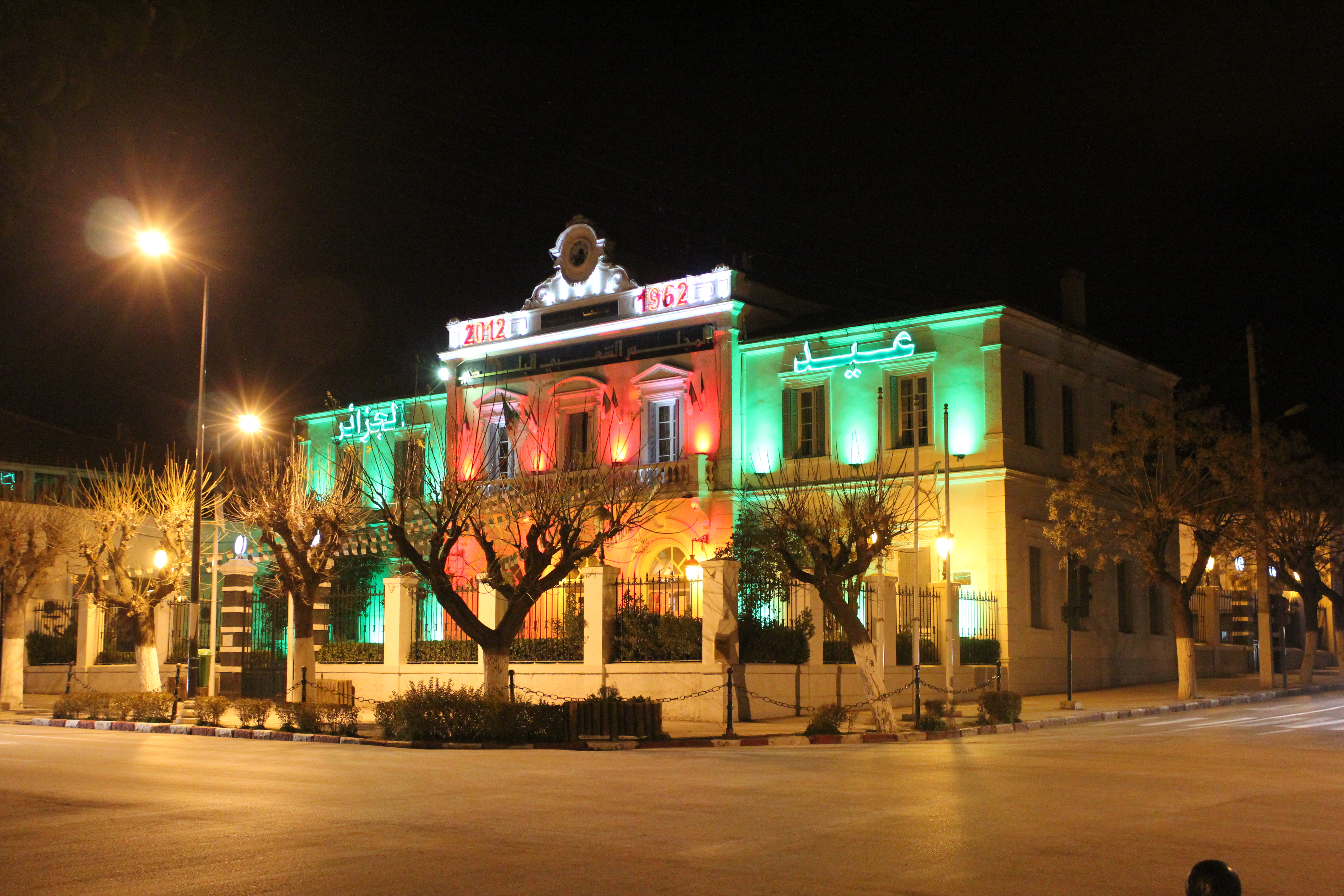 La mairie de Batna